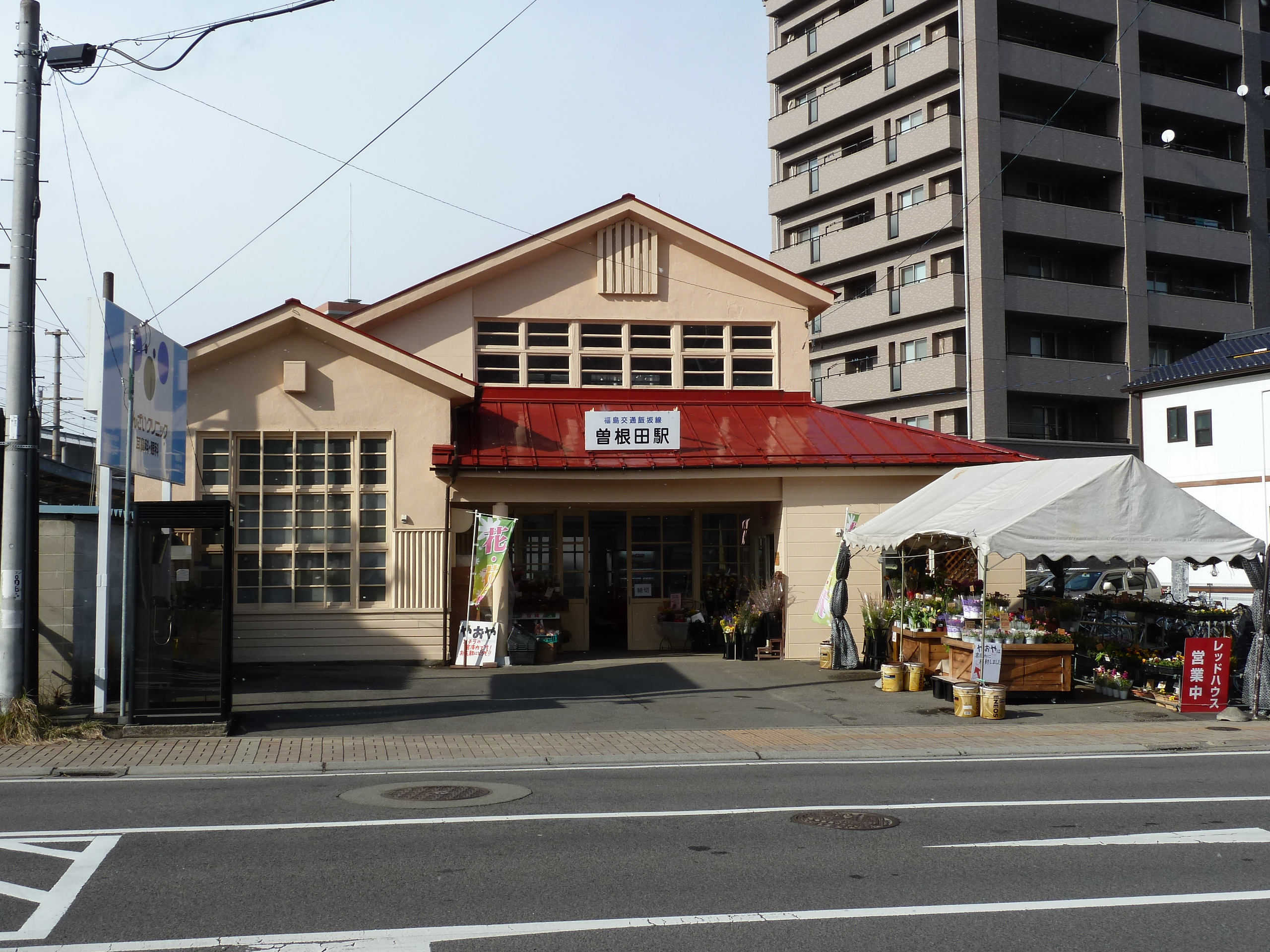 福島交通飯坂線 曽根田駅